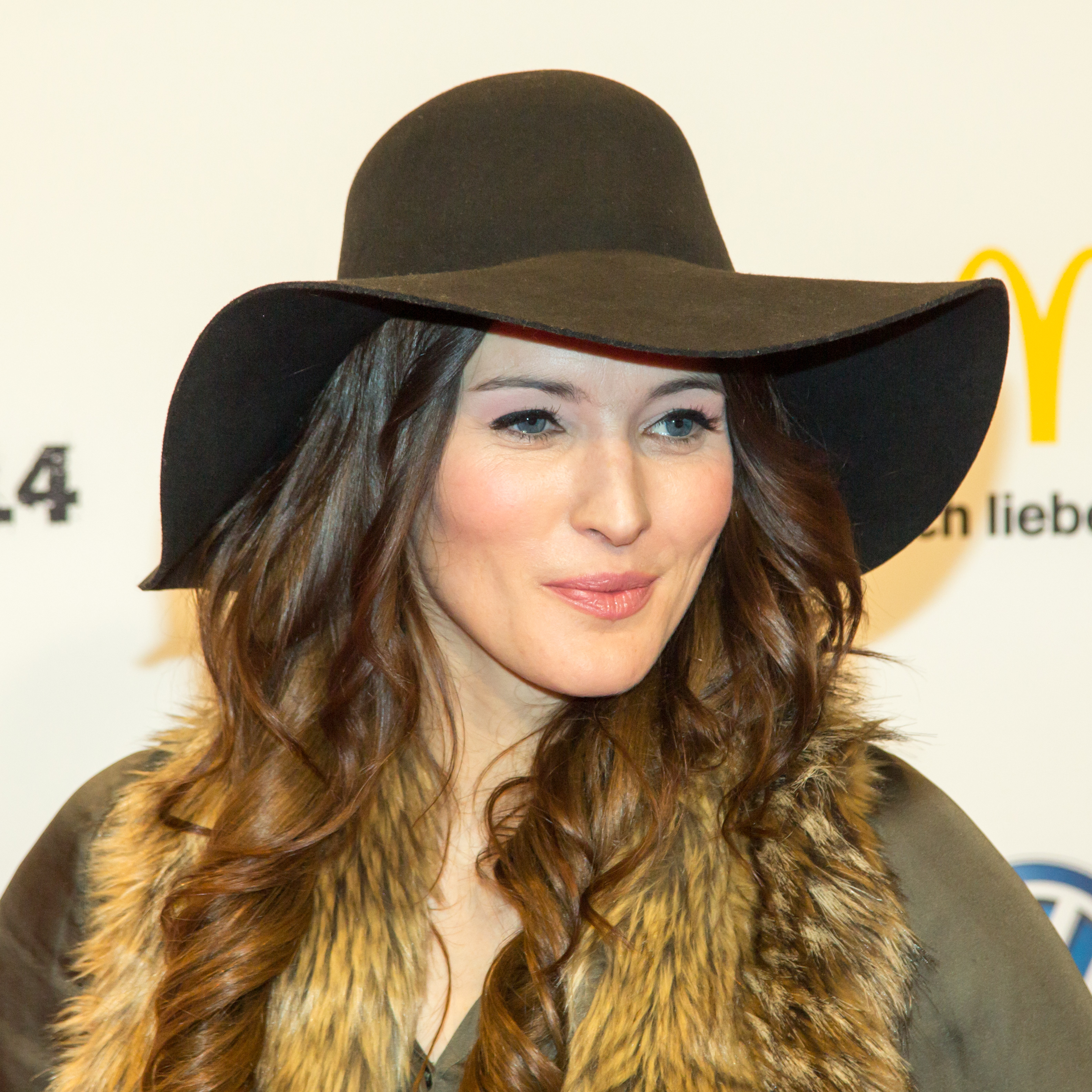 1LIVE Krone 2014 in der Bochumer Jahrhunderthalle: Jeannine Michaelsen auf dem roten Teppich